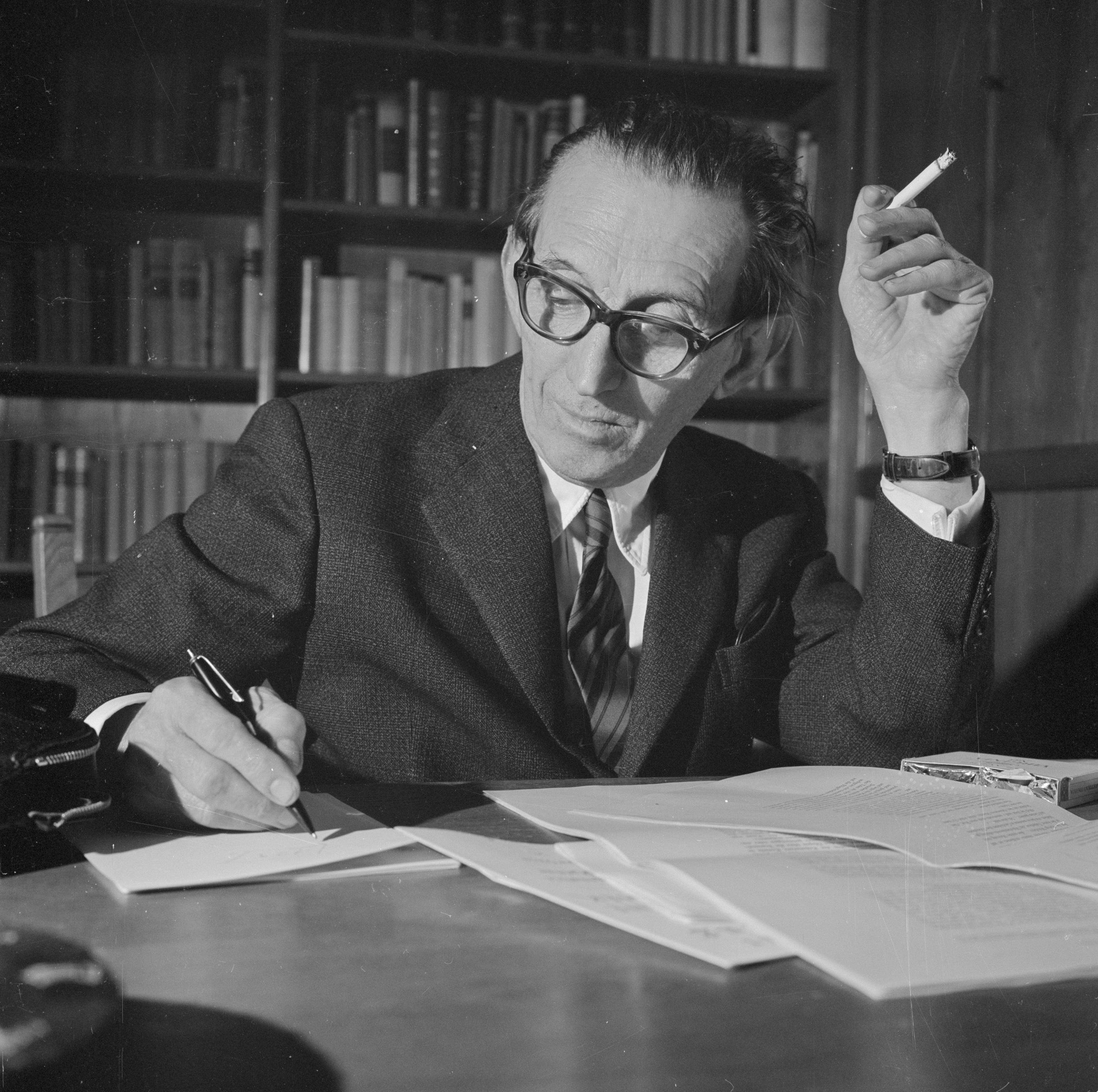 Collectie / Archief : Fotocollectie Van de Poll Reportage / Serie : Op bezoek in Icking Beschrijving : Walter Mehring schrijvend en rokend achter een bureau Datum : juni 1964 Locatie : Duitsland, München, West-Duitsland Trefwoorden : boeken, interieurs, meubilair, roken, schrijfwaren, schrijven, schrijvers, woningen Persoonsnaam : Mehring, Walter Fotograaf : Poll, Willem van de, [onbekend] Auteursrechthebbende : Nationaal Archief Materiaalsoort : Negatief (6x6) Nummer archiefinventaris : bekijk toegang 2.24.14.02 Bestanddeelnummer : 254-5072